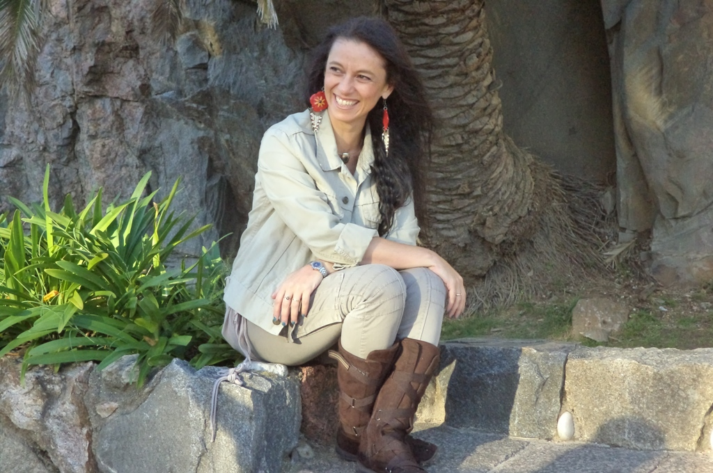 Cecilia Curbelo comunicadora, escritora y editora uruguaya